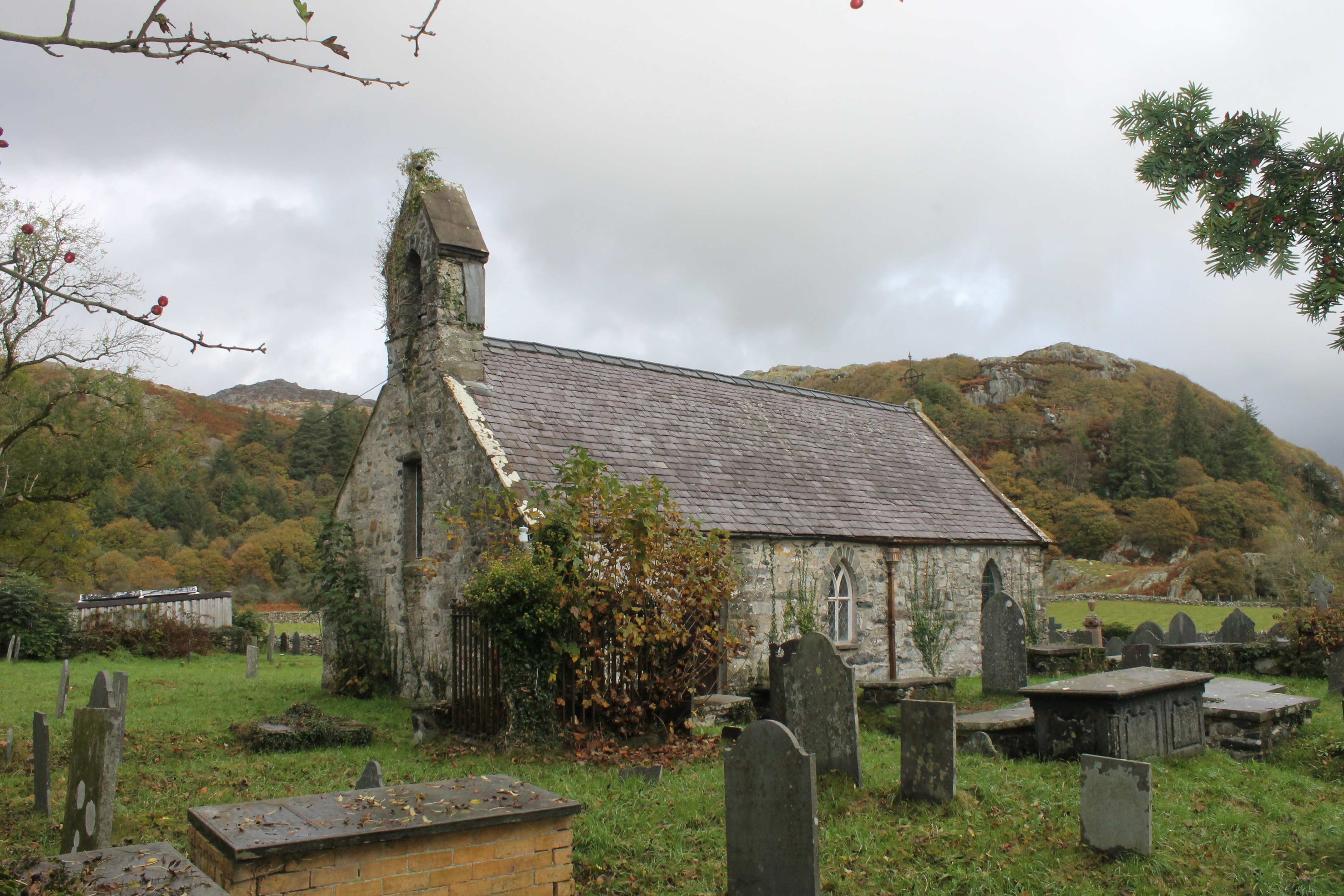 Eglwys Llanfihangel-y-Pennant, Dolbenmaen, gwynedd. Cofrestrwyd yn Gradd II*.